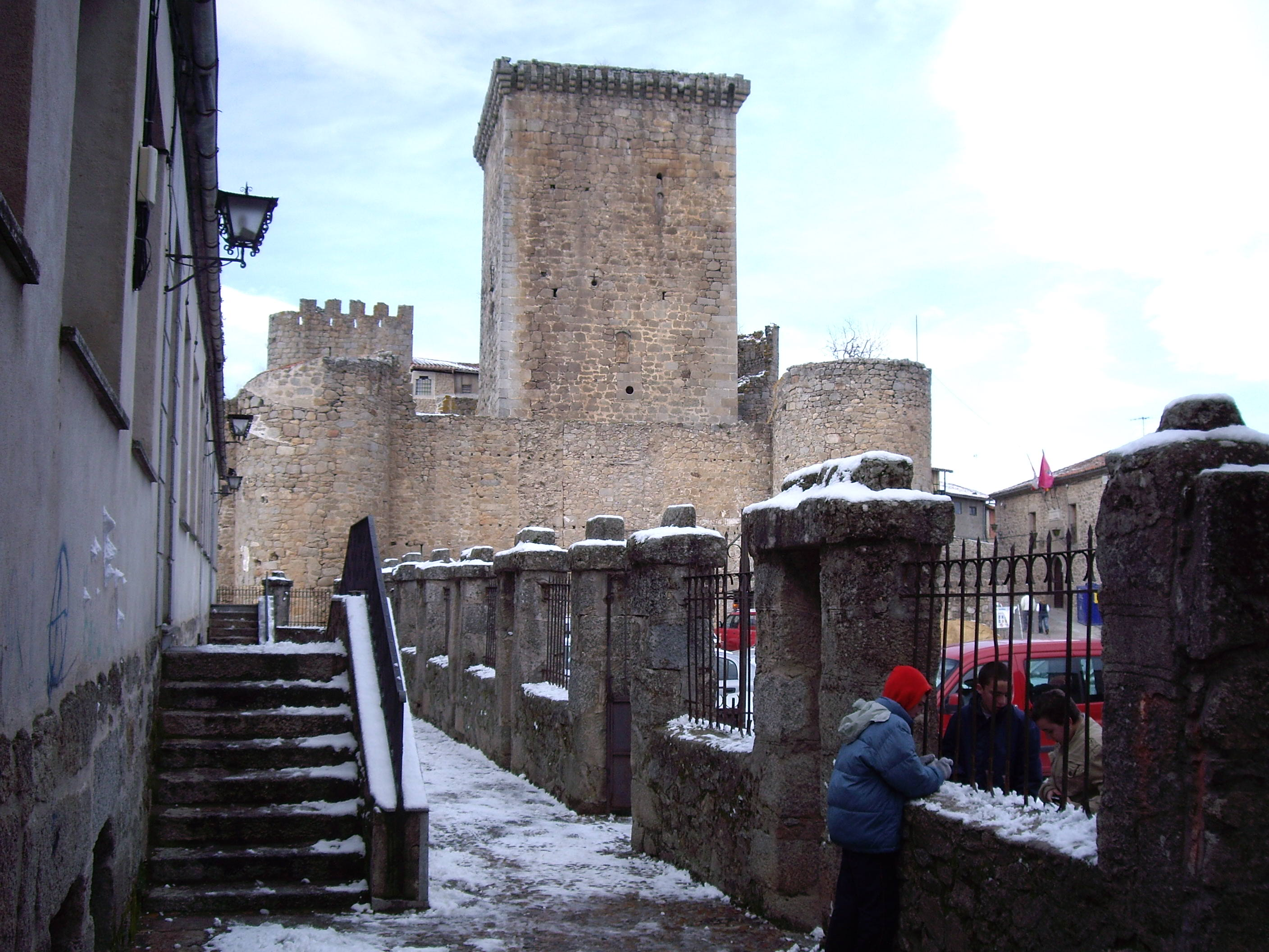 Castillo de Miranda del Castañar, Sierra de Francia, Salamanca, Castilla y León, España